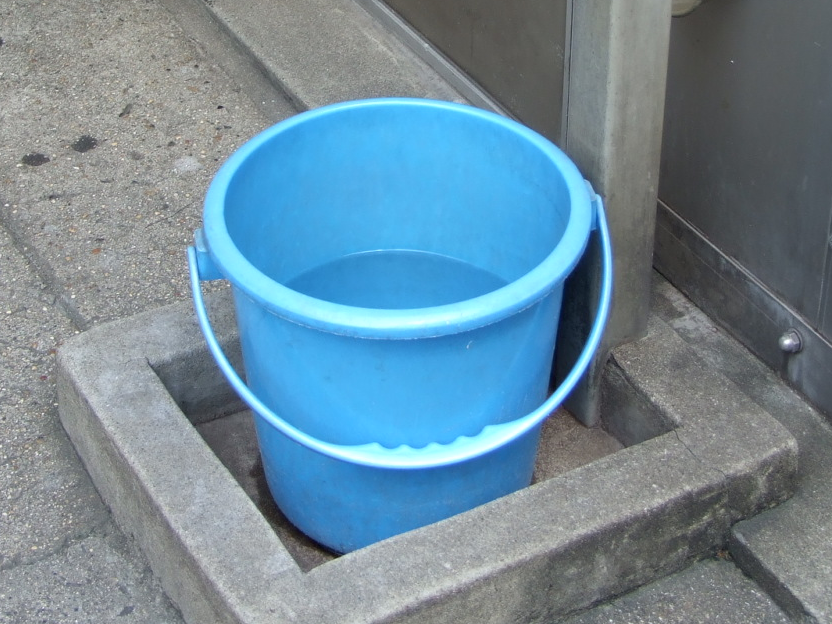 Buket_HDPE01